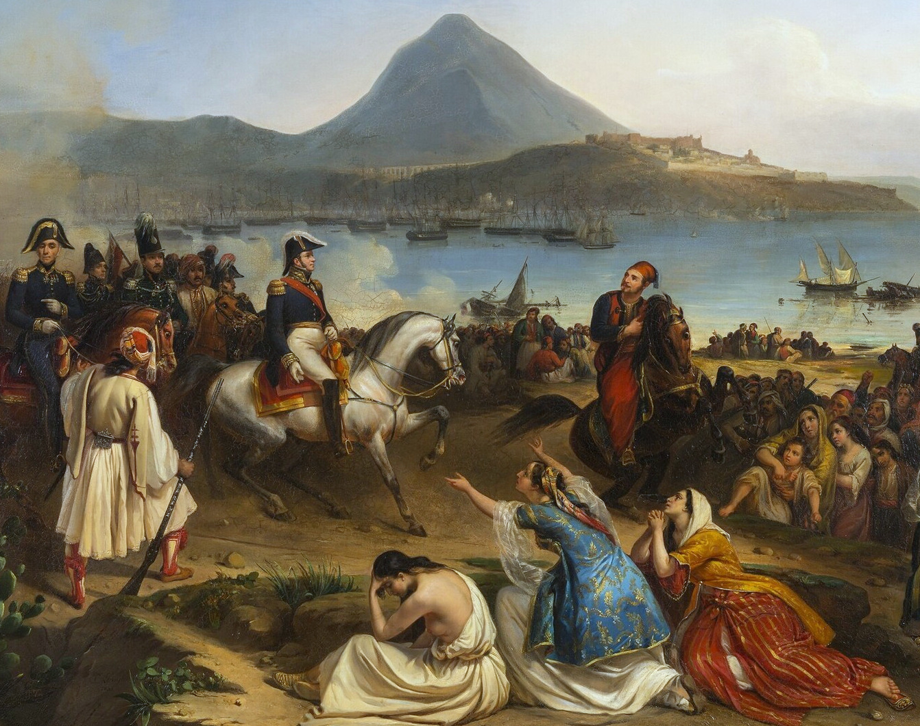 Entrevue du général Maison et d'Ibrahim Pacha, à Navarin, septembre 1828 (détail). Intervention française en Morée (1828-1833). Dimensions : 197 x 267 cm. Cadre : 203 x 272,5 x 7,5 cm. Matière et technique : huile sur toile.